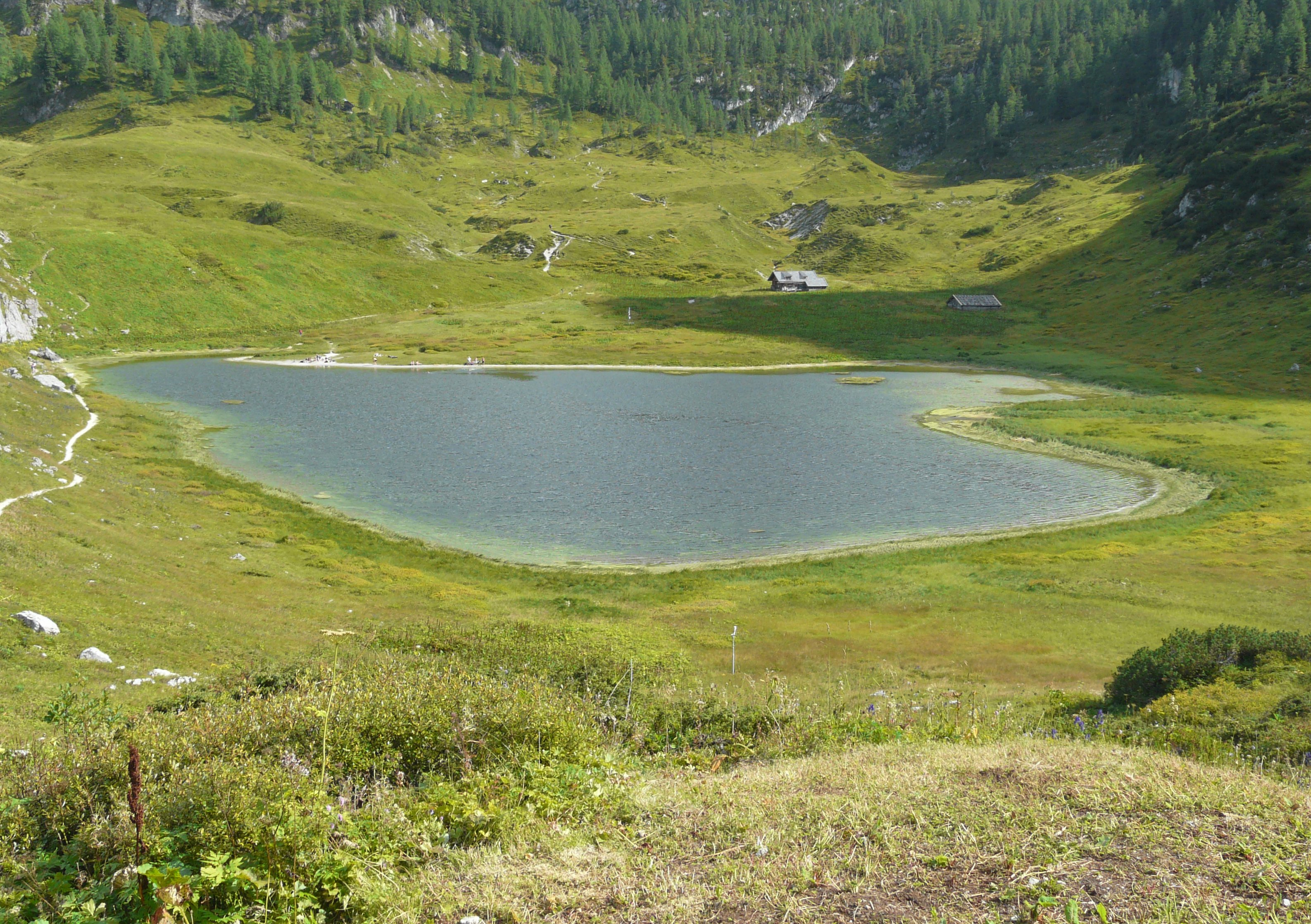 Der Funtensee in den Berchtesgadener Alpen